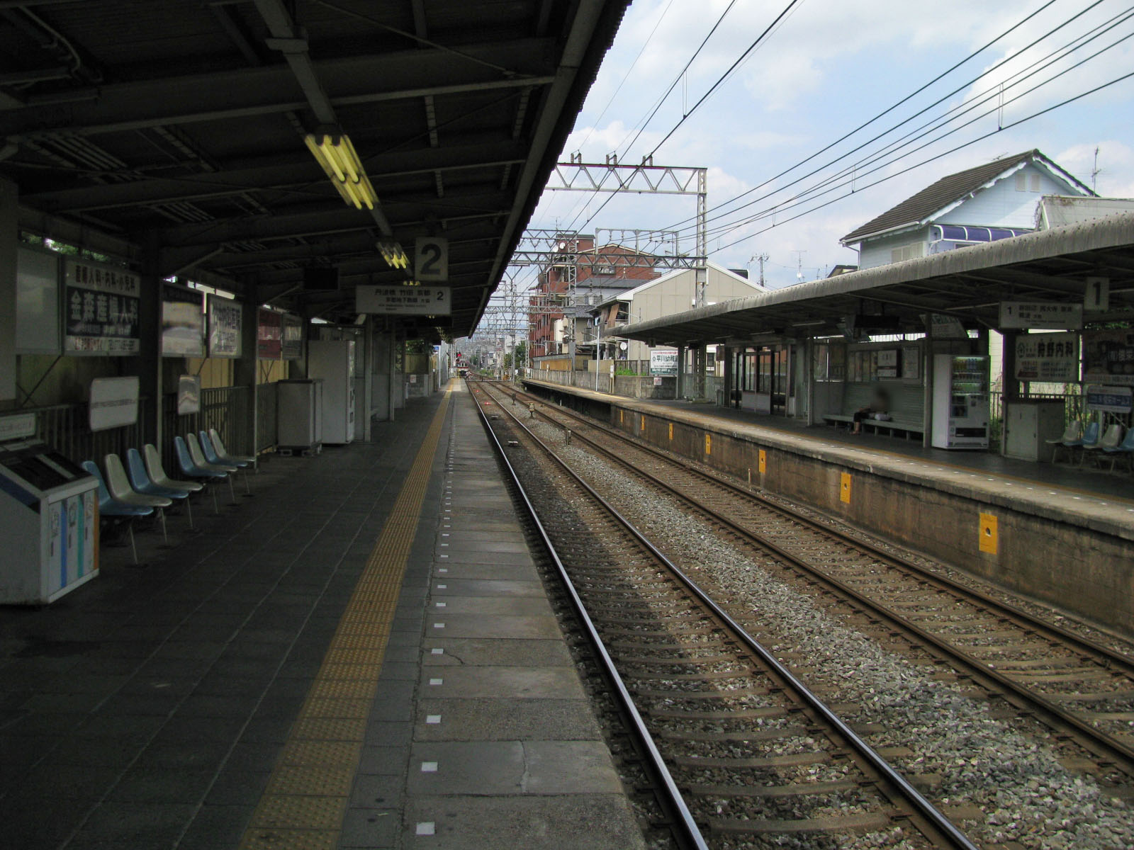 近鉄久津川駅